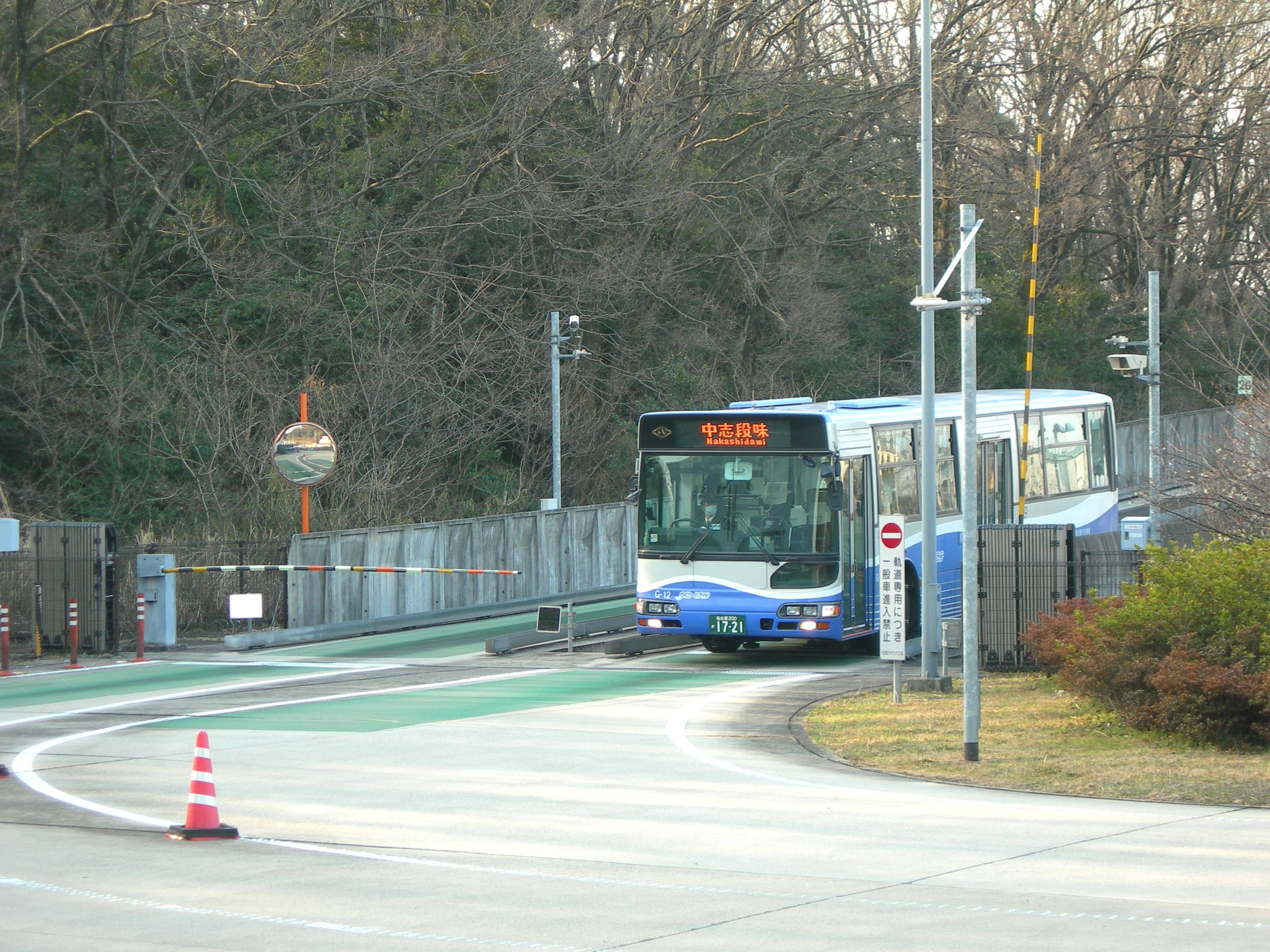 ゆとりーとライン・専用区間出入口